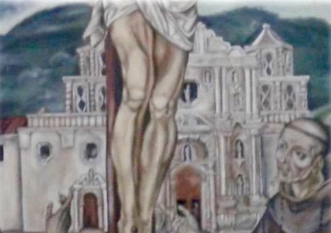 Grabado antiguo que muestra la Iglesia de la Recolección en Santiago de los Caballeros de Guatemala en el siglo XVIII.